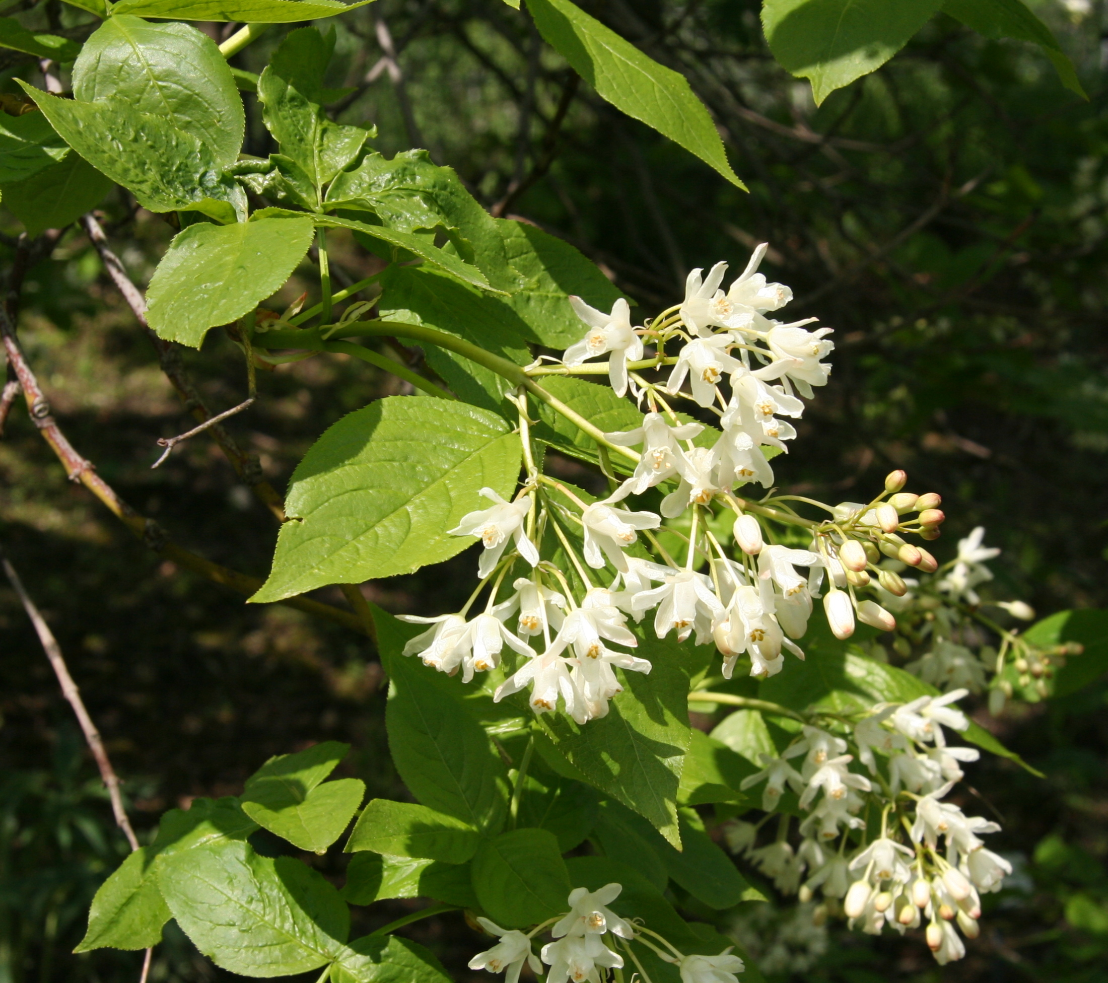 Staphylea colchica im Botanischen Garten Dresden